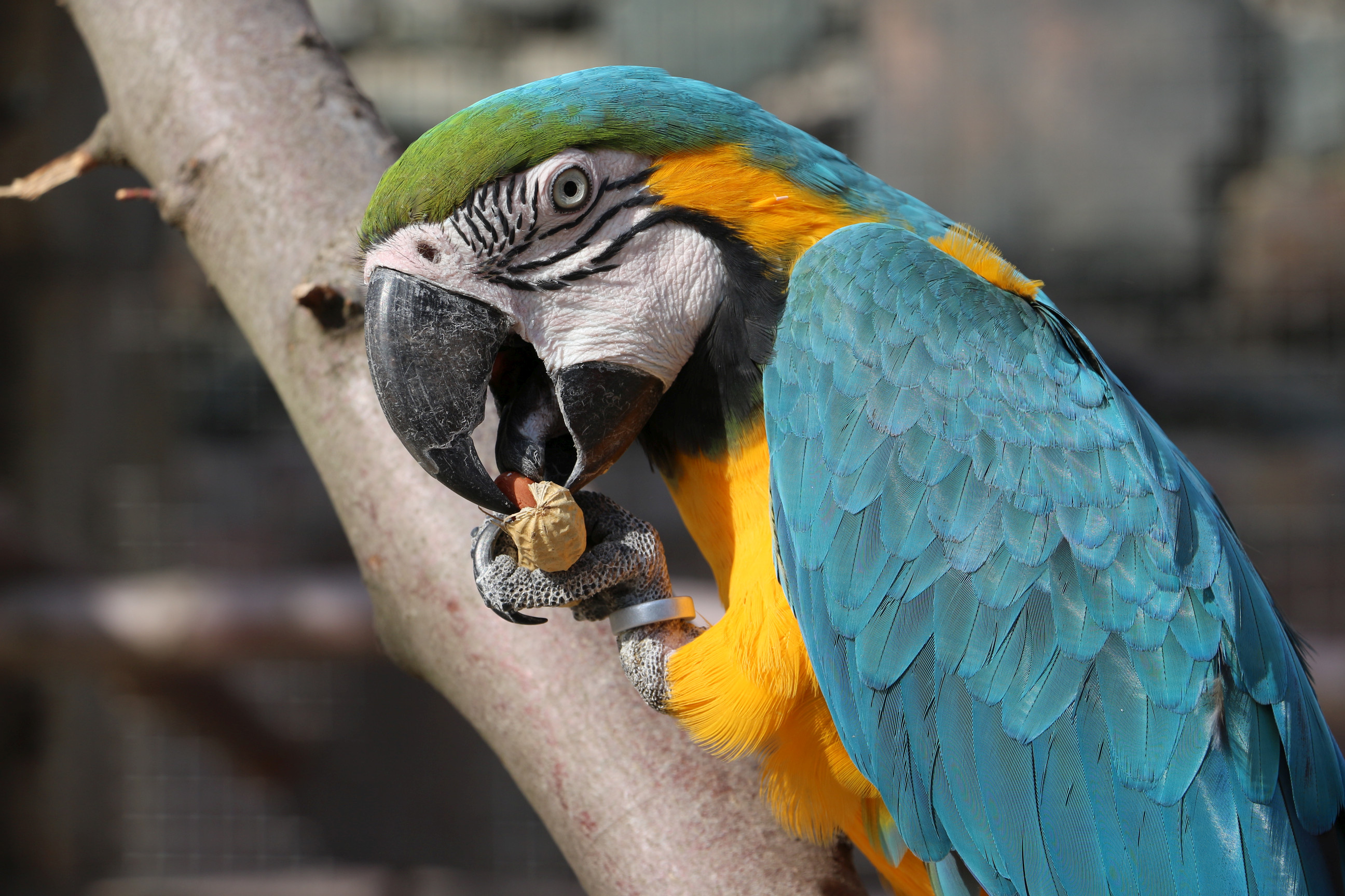 Nahaufname eines Aras in der Vogelburg - unbearbeitet.